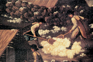 "Els nevaters de la Massanella" muestra la recogida de nieve en la sierra de Tramuntana (Mallorca)